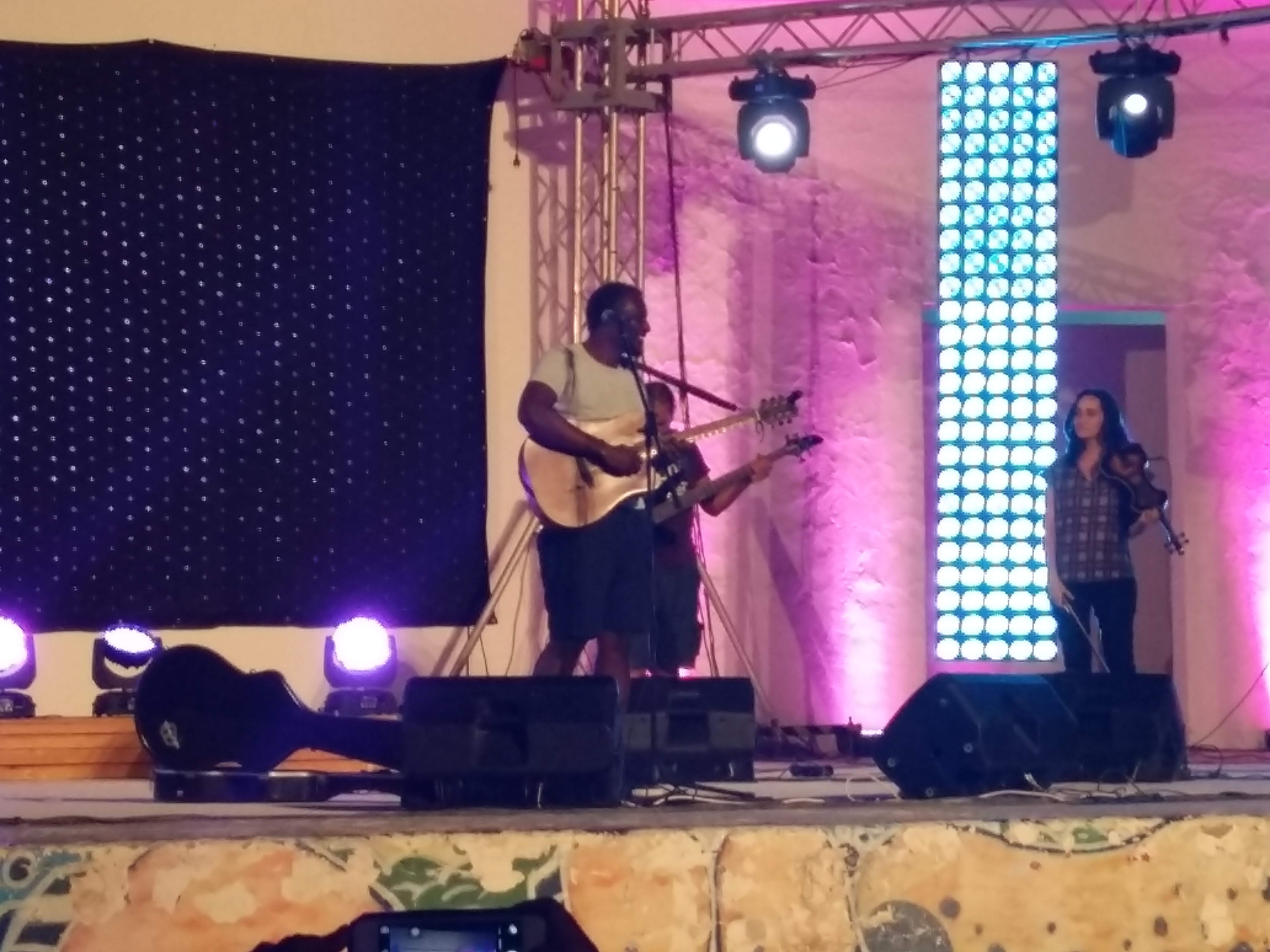 sabri mosbah